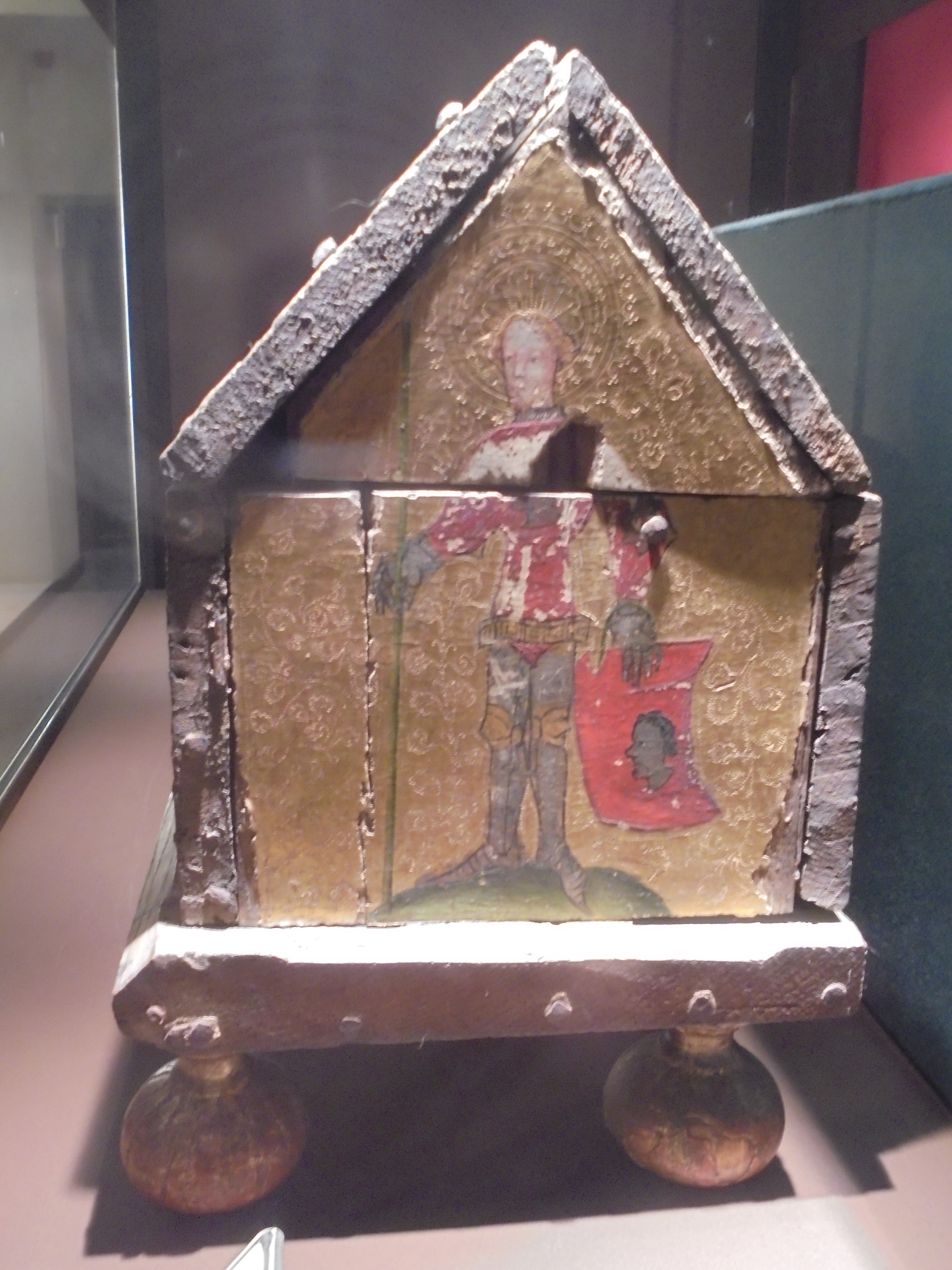 Châsse réalisée vers 1400, Don de l’évêque de Namur à la Société archéologique de Namur en 1858. Classé comme trésor de la Communauté Française le 23 Novembre 2010. Œuvre exposée au Musée provinciale des Arts Anciens du Namurois (Musée TreM.a) à Namur.